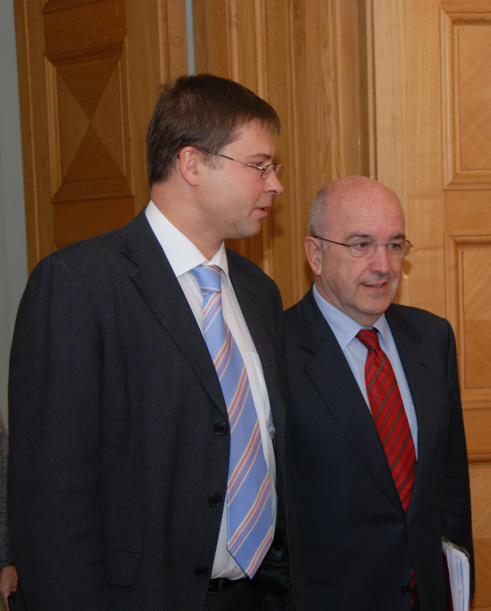 Ministru prezidents Valdis Dombrovskis (no kreisās) un ES Ekonomikas un monetāro lietu komisārs Hoakins Almunja (Joacquín Almunia) (no labās) Foto: Aivis Freidenfelds, Valsts kanceleja